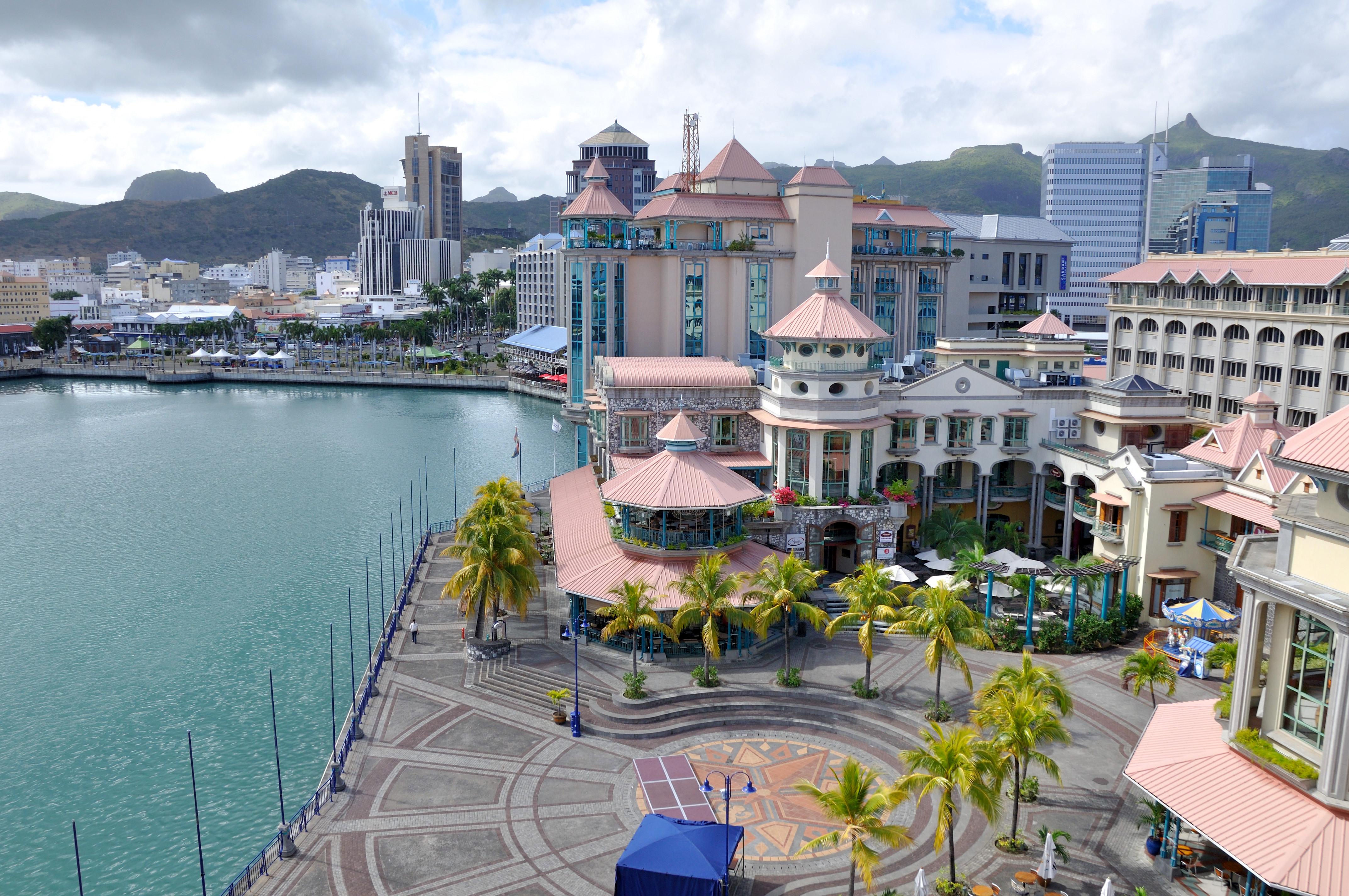 Mauritius, Port Louis